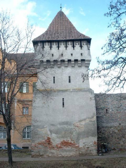 Töpferturm an der Harteneckgasse in Hermannstadt (RO).